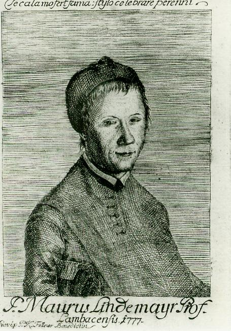 Maurus Lindemayr (* 17. November 1723 in Neukirchen bei Lambach; † 19. Juli 1783 ebenda) war Schriftsteller und Verfasser zahlreicher Theaterstücke in oberösterreichischer (mittelbairischer) Sprache im 18. Jahrhundert, Kupferstich